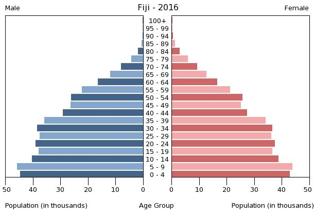 A population pyramid illustrates the age and sex structure of a country's population and may provide insights about political and social stability, as well as economic development. The population is distributed along the horizontal axis, with males shown on the left and females on the right. The male and female populations are broken down into 5-year age groups represented as horizontal bars along the vertical axis, with the youngest age groups at the bottom and the oldest at the top. The shape of the population pyramid gradually evolves over time based on fertility, mortality, and international migration trends.